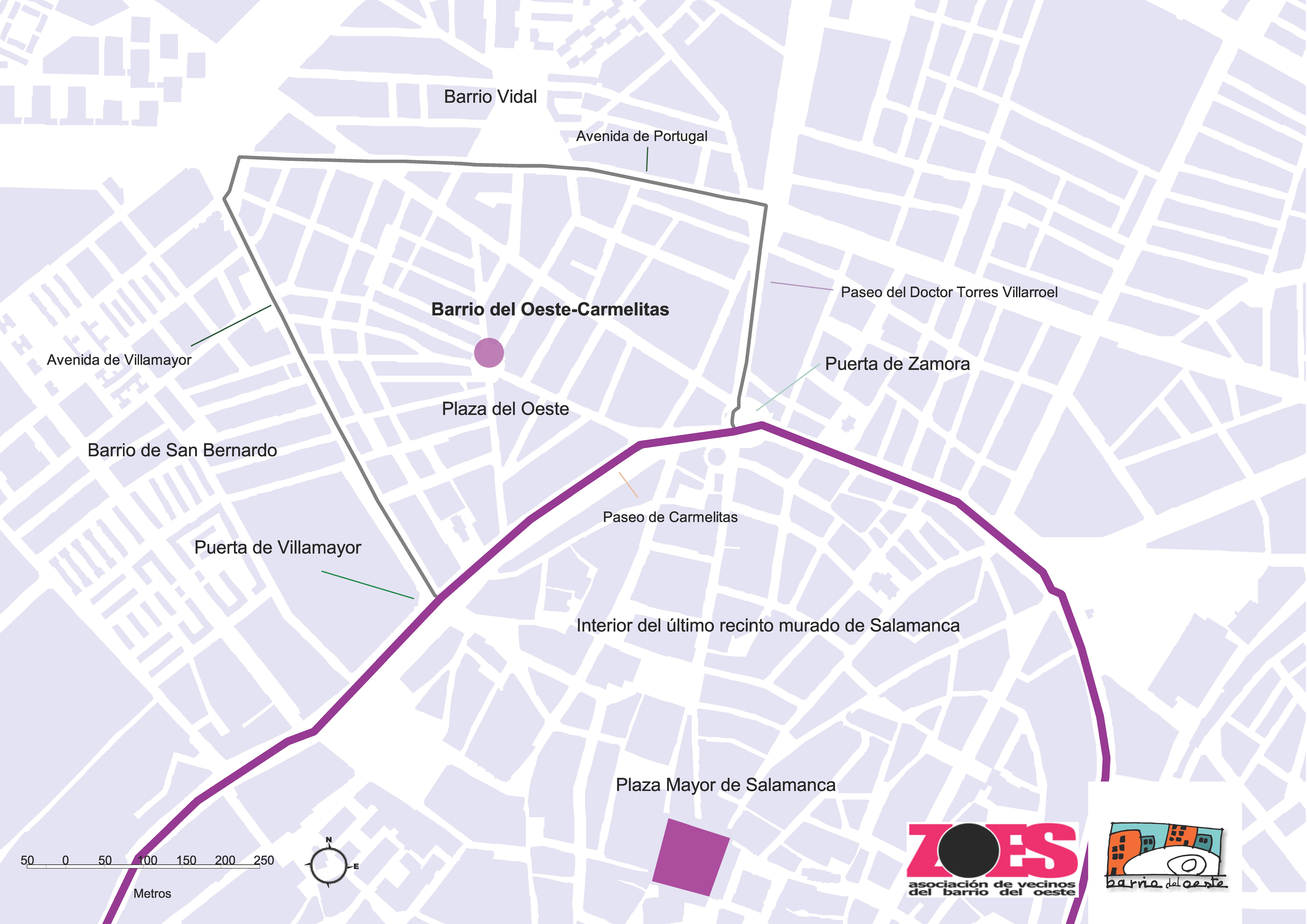 Plano de situación del Barrio de Carmelitas Oeste con las referencias de límites principales